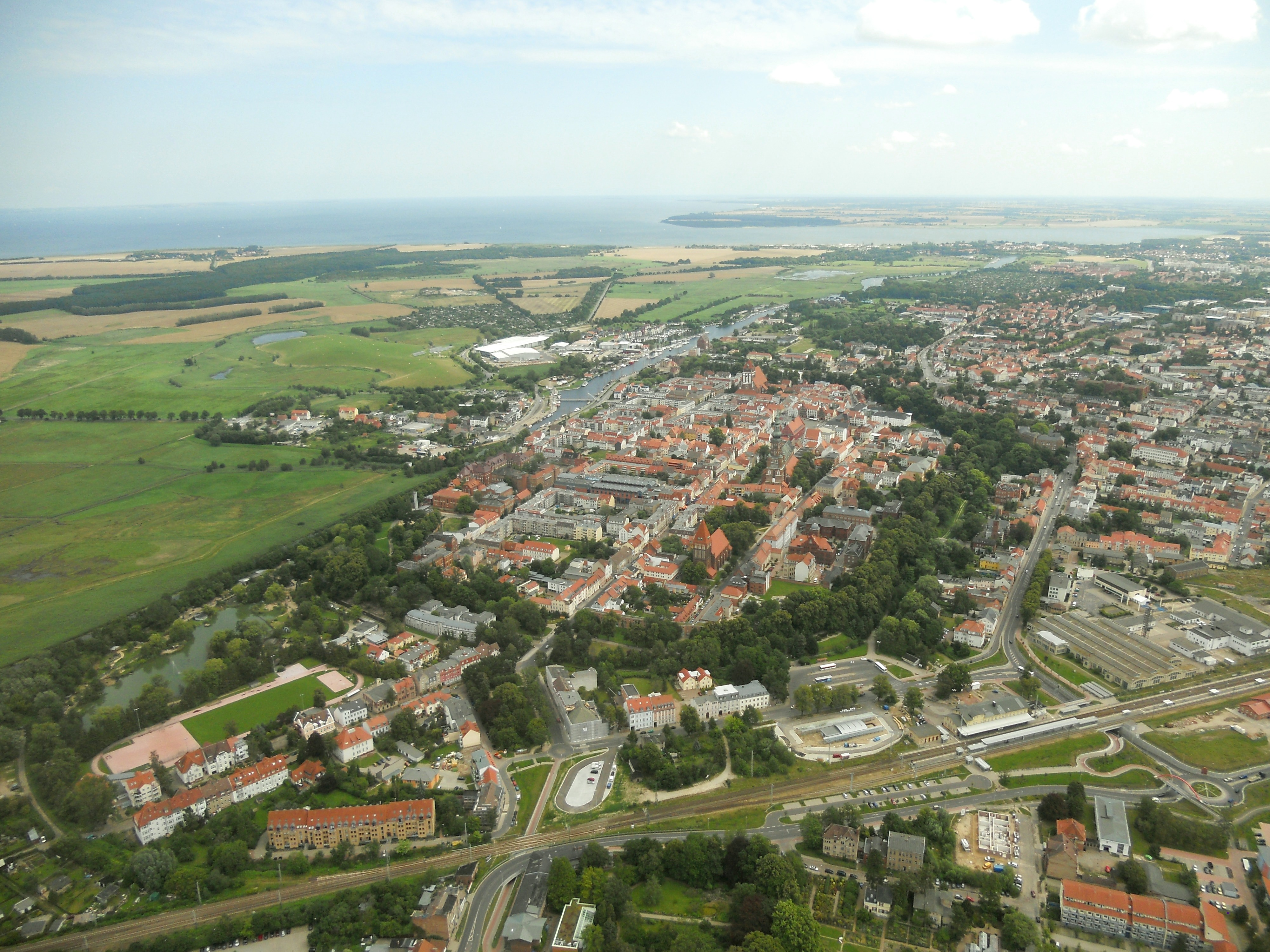 Blick nach Ostnordosten: Der historische Stadtkern Greifswalds